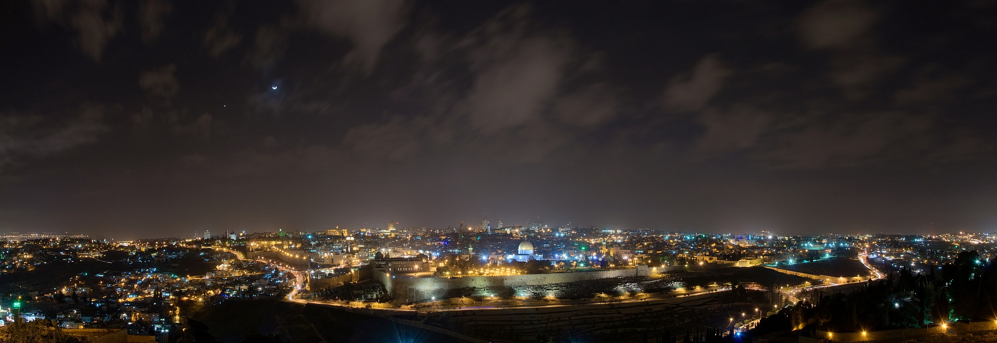 Panorama Jerusalem und Tempelberg bei Nacht